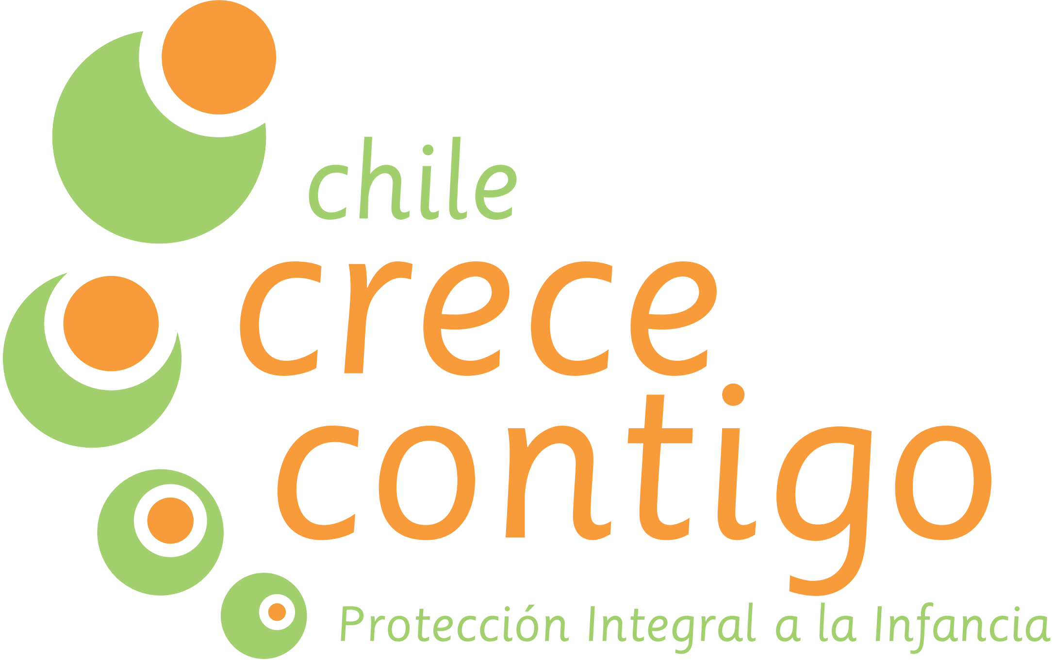 Logo del Sistema de Protección Integral a la Infancia Chile Crece Contigo